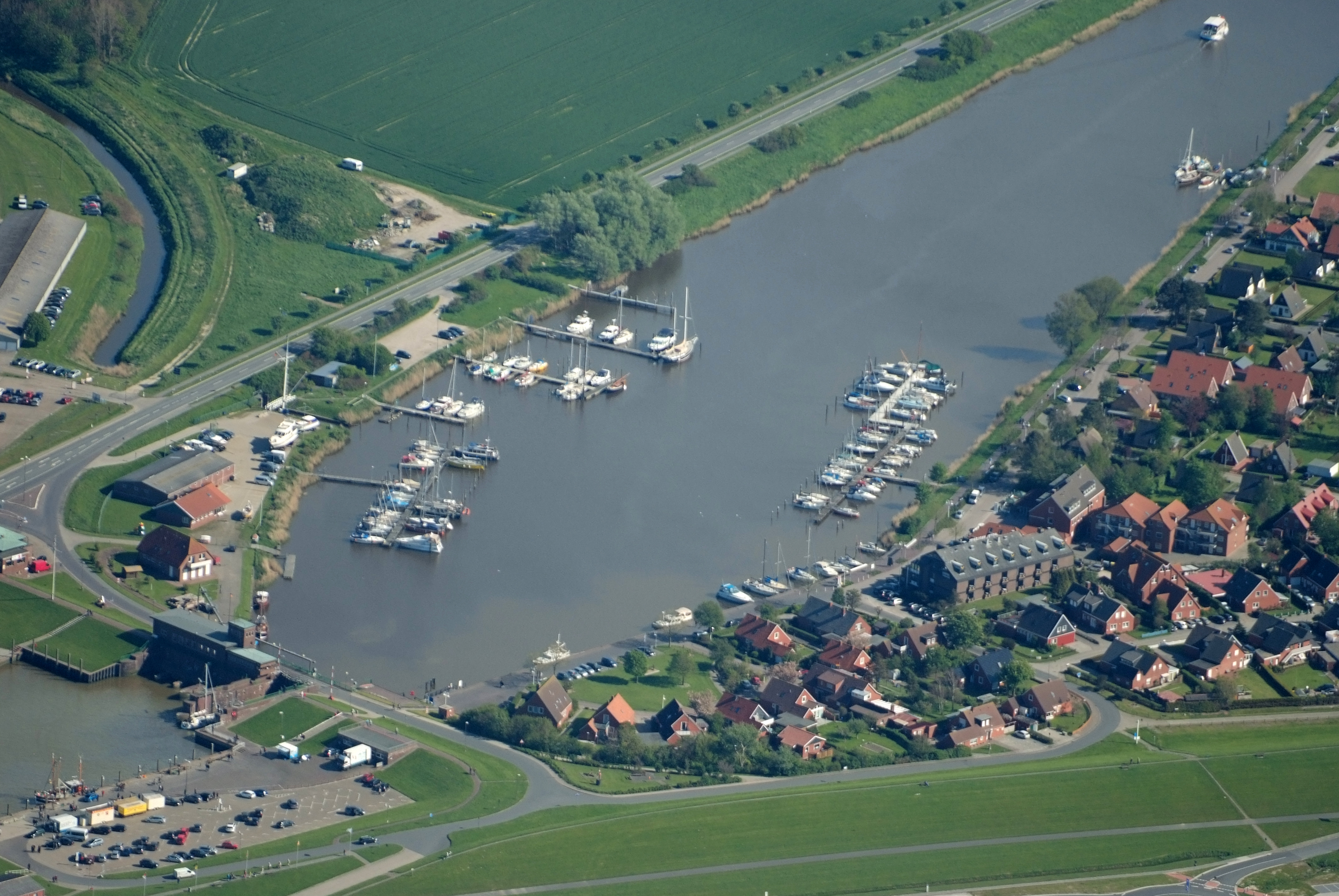 Fotoflug vom Flugplatz Nordholz-Spieka über Bremerhaven, Wilhelmshaven und die Ostfriesischen Inseln bis Borkum